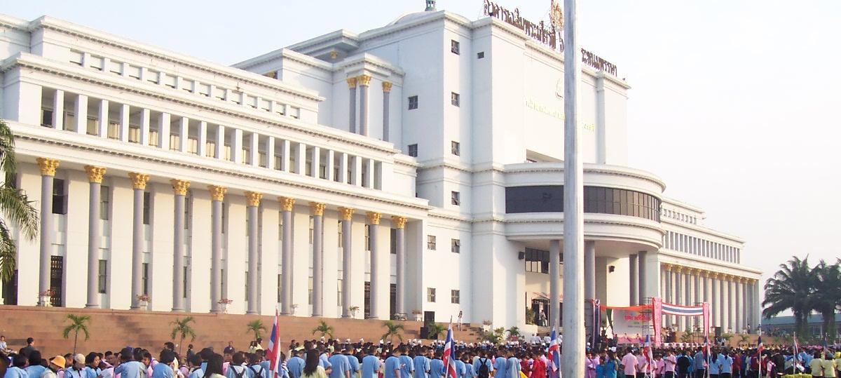 เทศบาลนครนครสวรรค์ - Nakhon Sawan, Thailand